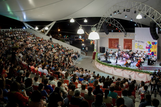 Şəki şəhərində keçirilən beynəlxalq İpək yolu festivalından